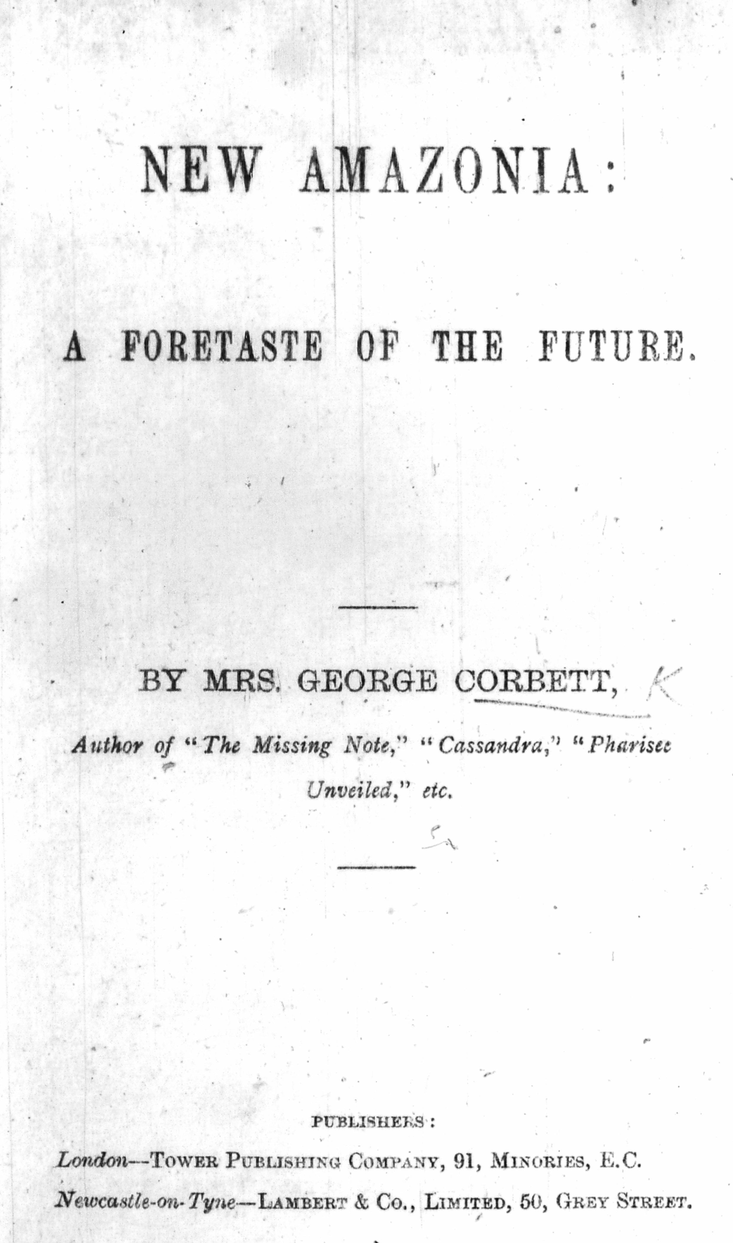 Nova Amazònia: un futur anticipat. obra original